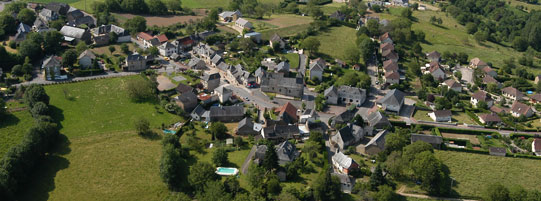 Vue générale de Venarsal (Corrèze, France)